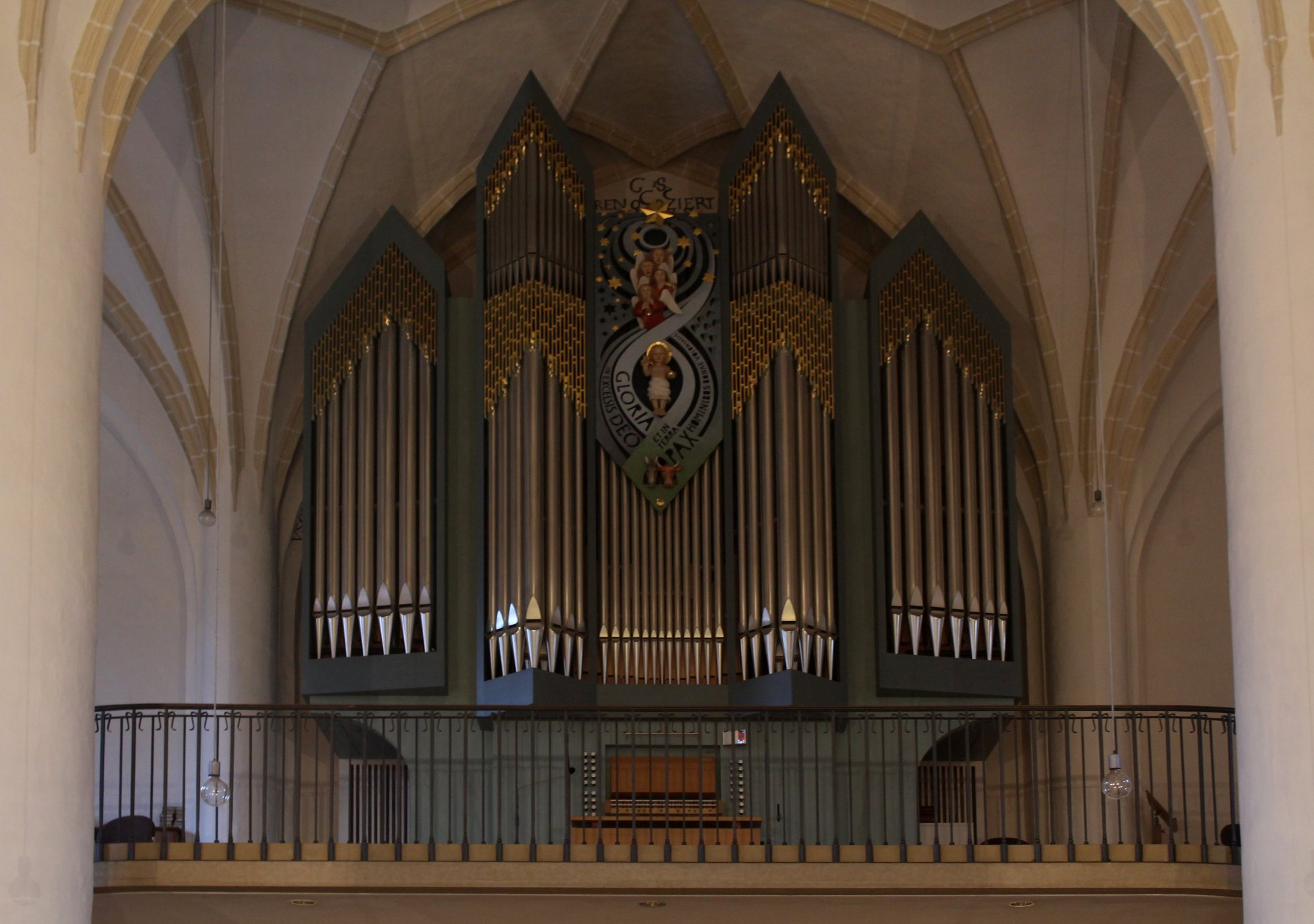 Orgel von St. Jakob in Schrobenhausen (2009, Mathis, II/30)